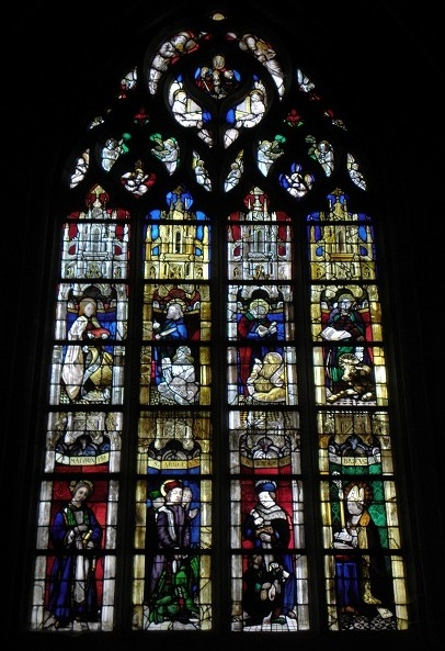 Les quatre évangélistes. Vitrail du XVe siècle de la basilique Saint-Sauveur de Dinan (22).